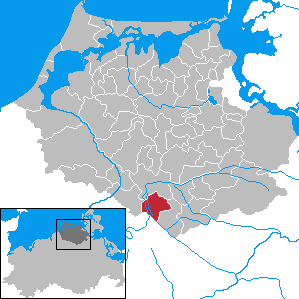 Deyelsdorf in Mecklenburg-Vorpommern - District Nordvorpommern